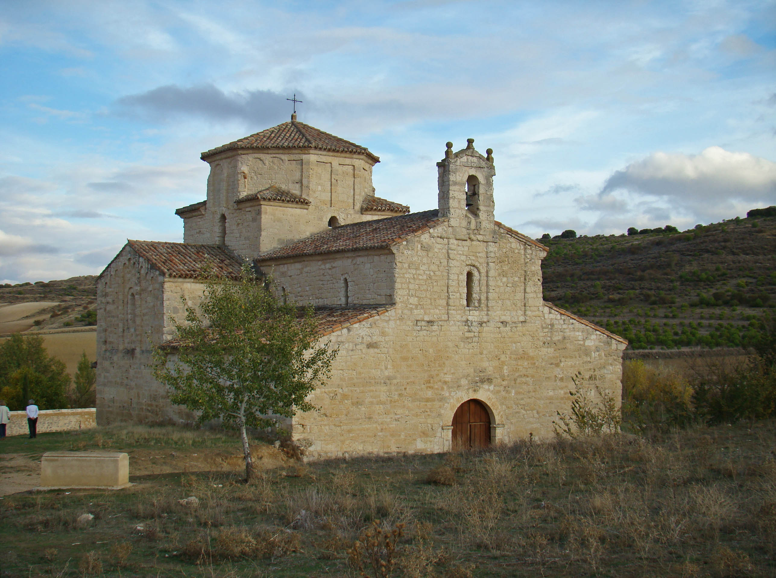 Iglesia (o ermita) de Nuestra Señora de la Anunciada perteneciente a la localidad de Urueña (Valladolid, España). Se encuentra en el valle, fuera del recinto amurallado de esta localidad. Fue construida en el siglo XI en estilo románico lombardo.